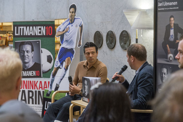 Jari Litmanen ja Paavo Arhinmäki kirjan julkistamistilaisuudessa Akateemisessa kirjakaupassa.